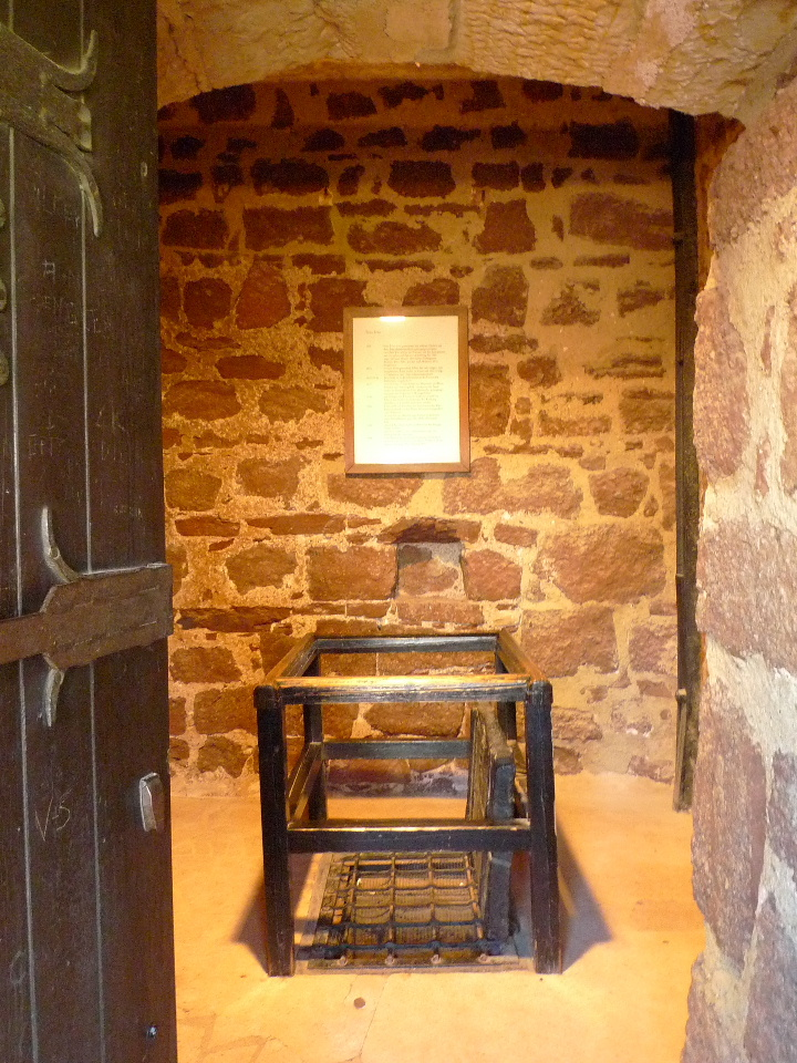 Wartburg - Raum im Mittelgeschoss des Südturmes mit Öffnung im Fußboden - das sog. Angstloch - einziger Zugang zum Verlies des Täufers Fritz Erbe